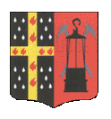 Armoirie de la commune de Sambreville